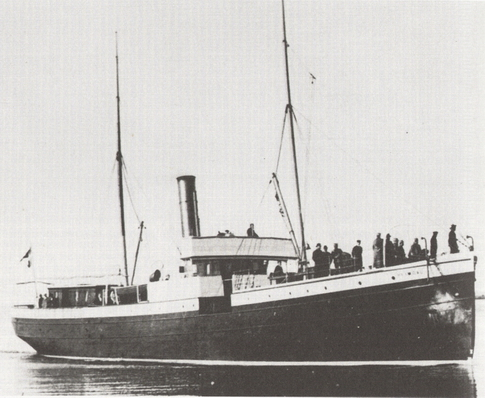 S/S Heimdal 1873. Bornholm